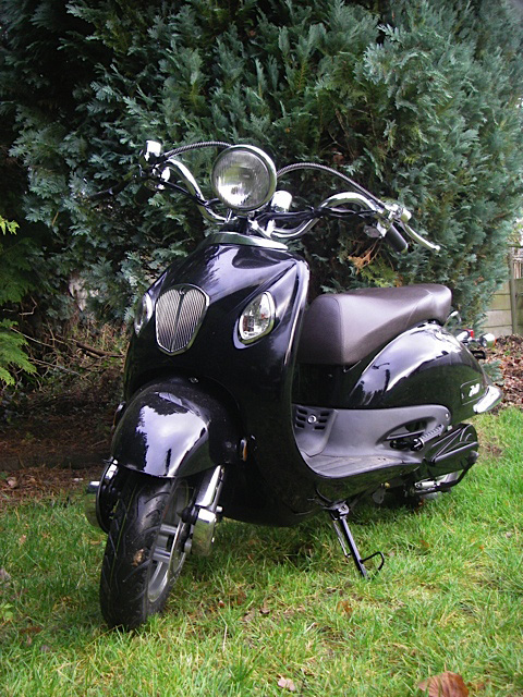 Zinelli elektrische retro-scooter zonder rugsteun en bagagerek, kleur Nero